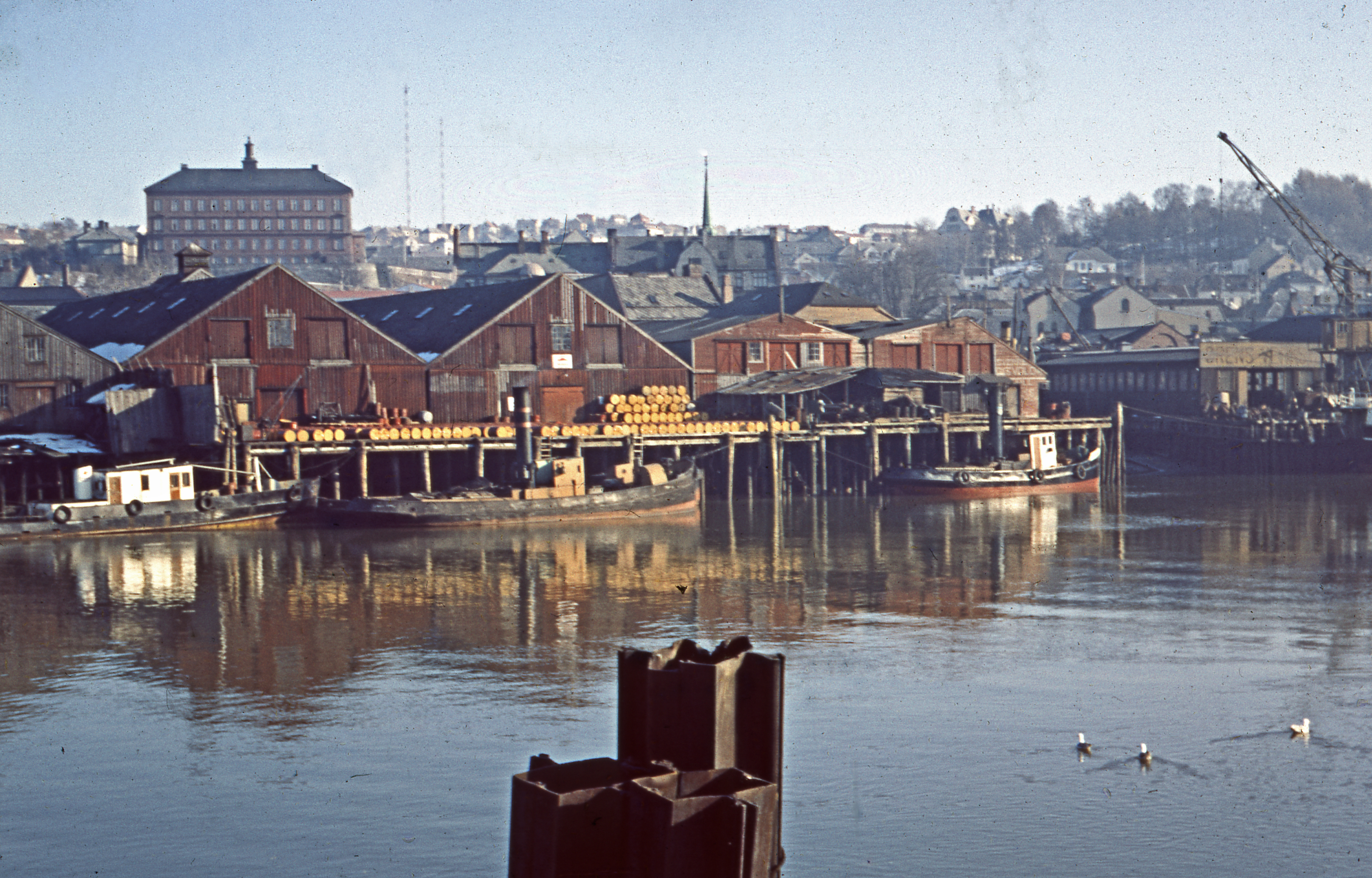 Format: Glasspositiv (Dias) Dato / Date: ca. 1954 - 1968 Fotograf / Photographer: Ukjent Sted / Place: Nedre Elvehavn, Trondheim Wikipedia: Nedre Elvehavn Eier / Owner Institution: Trondheim byarkiv, The Municipal Archives of Trondheim Arkivreferanse / Archive reference: Tor.H43.B77.F18573 Merknad: Fra Byantikvarens lysbildesamling. Bildene er merket Trondheim 1954 - 1968, men de aller fleste synes å være fra omkring 1954 / 1955.